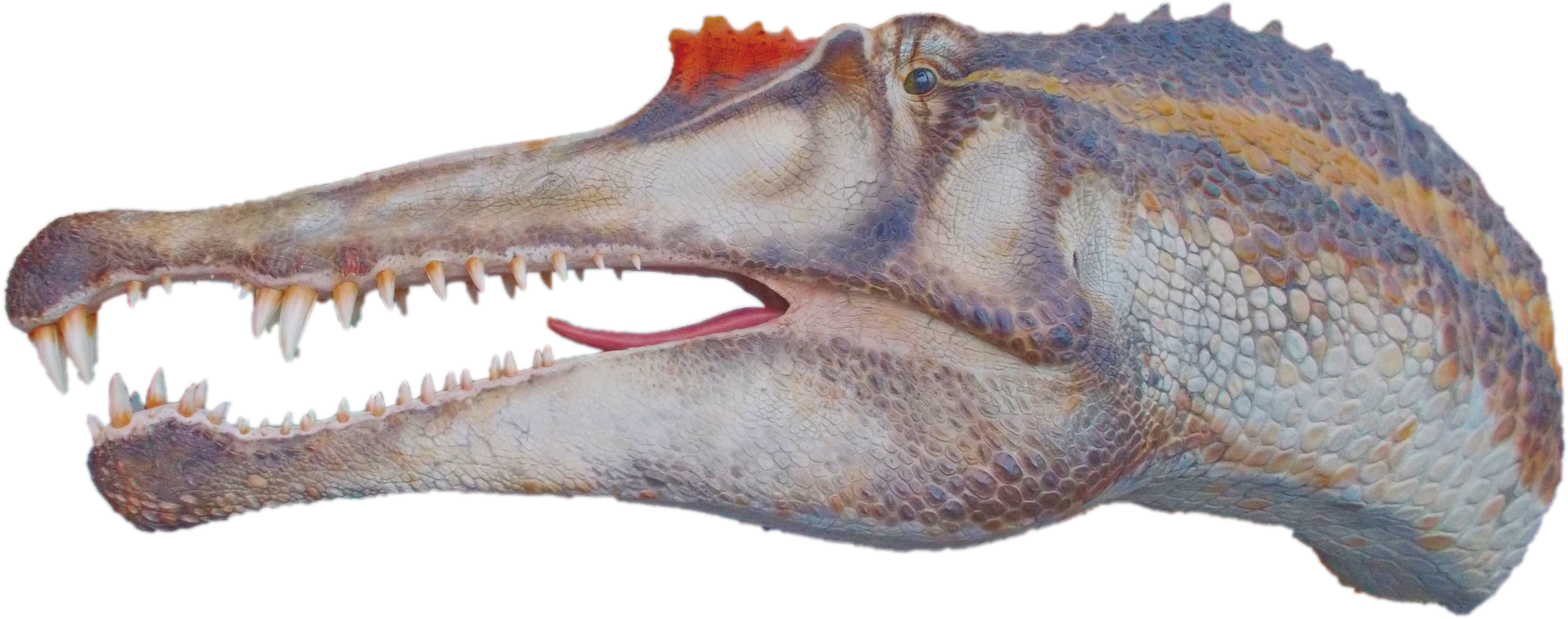 ricostruzione testa di Spinosauro